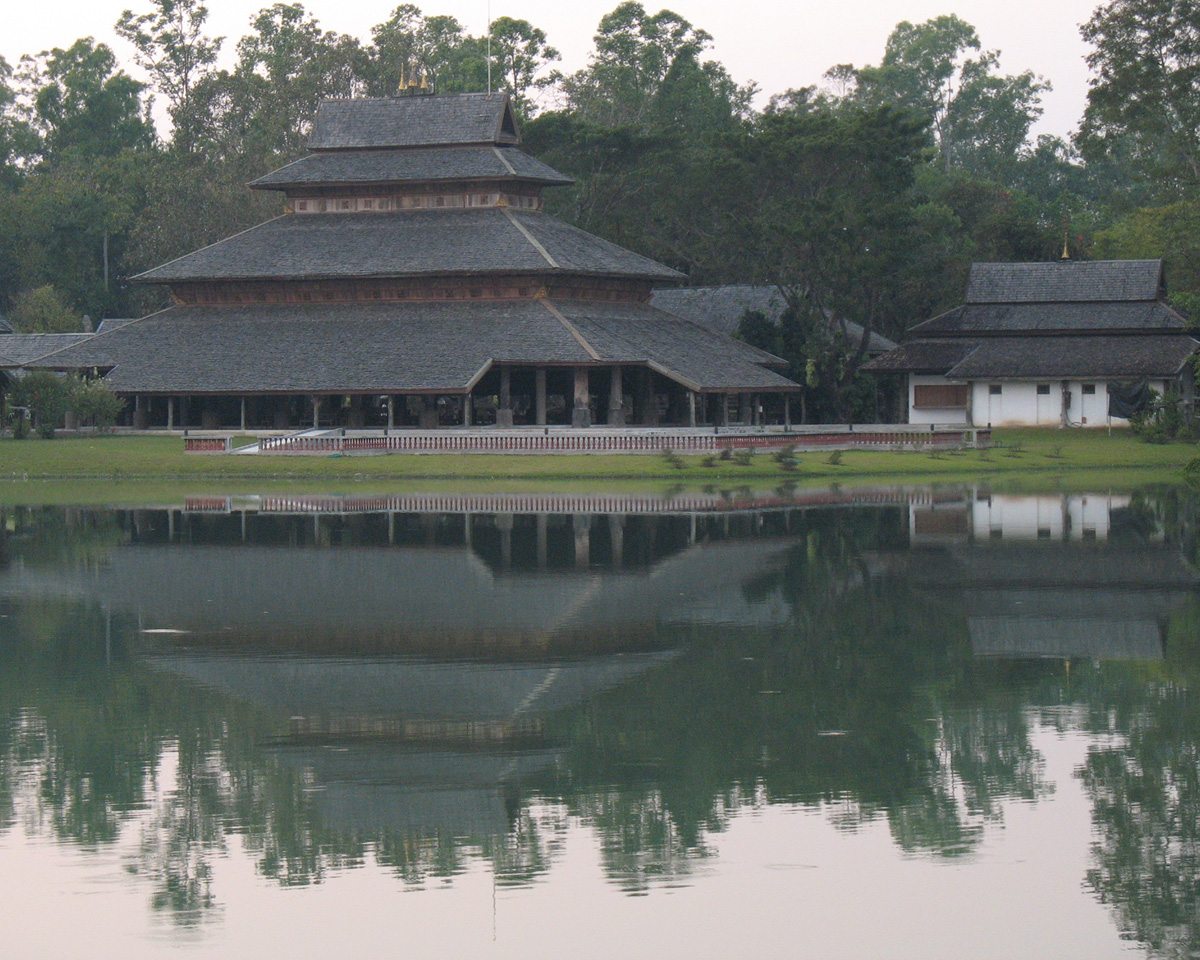 Rai Mae Fah Luang Art and Cultural Park, Chiang Rai Province.